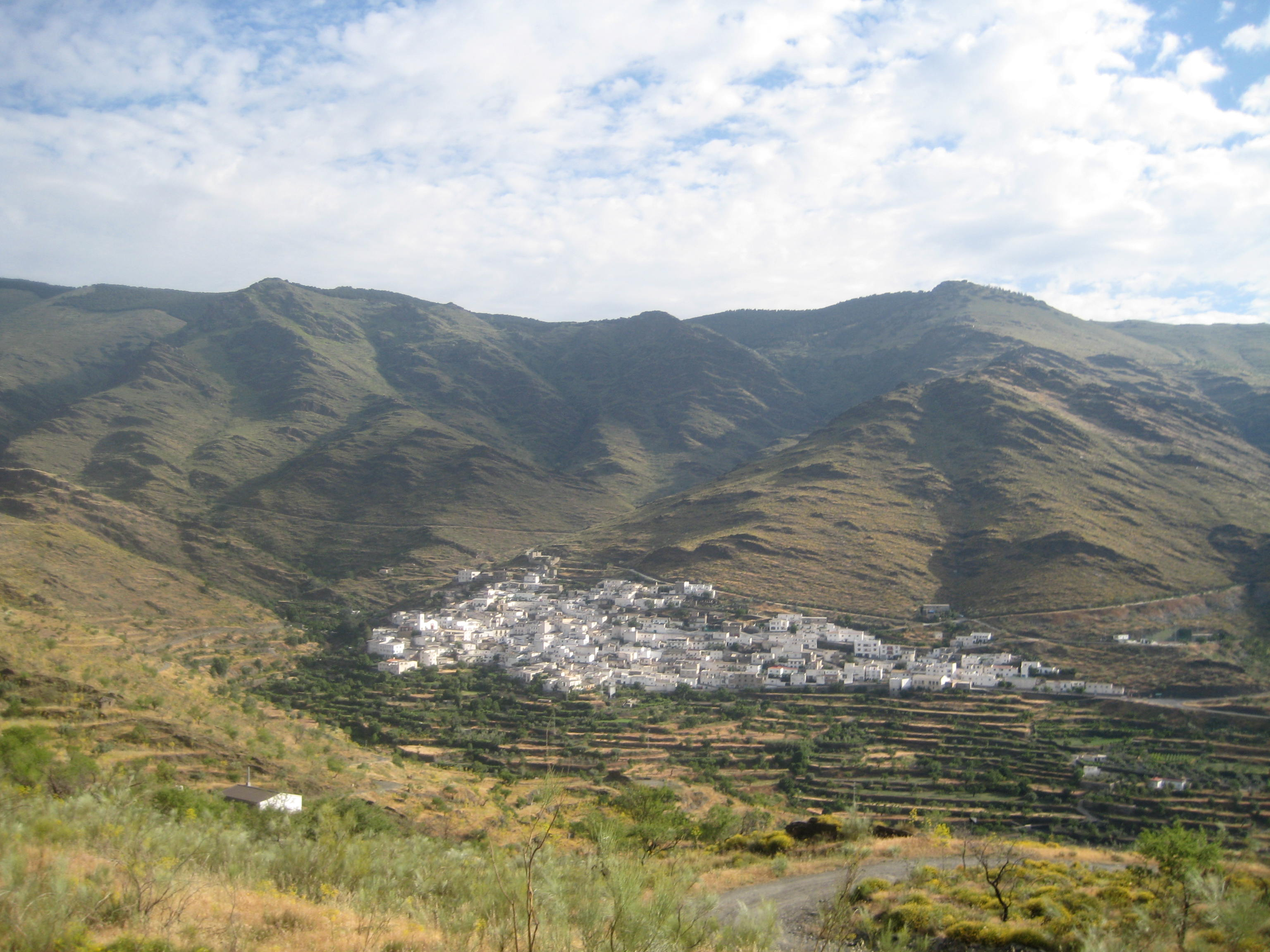 Municipio de Senés, en Almería, España.